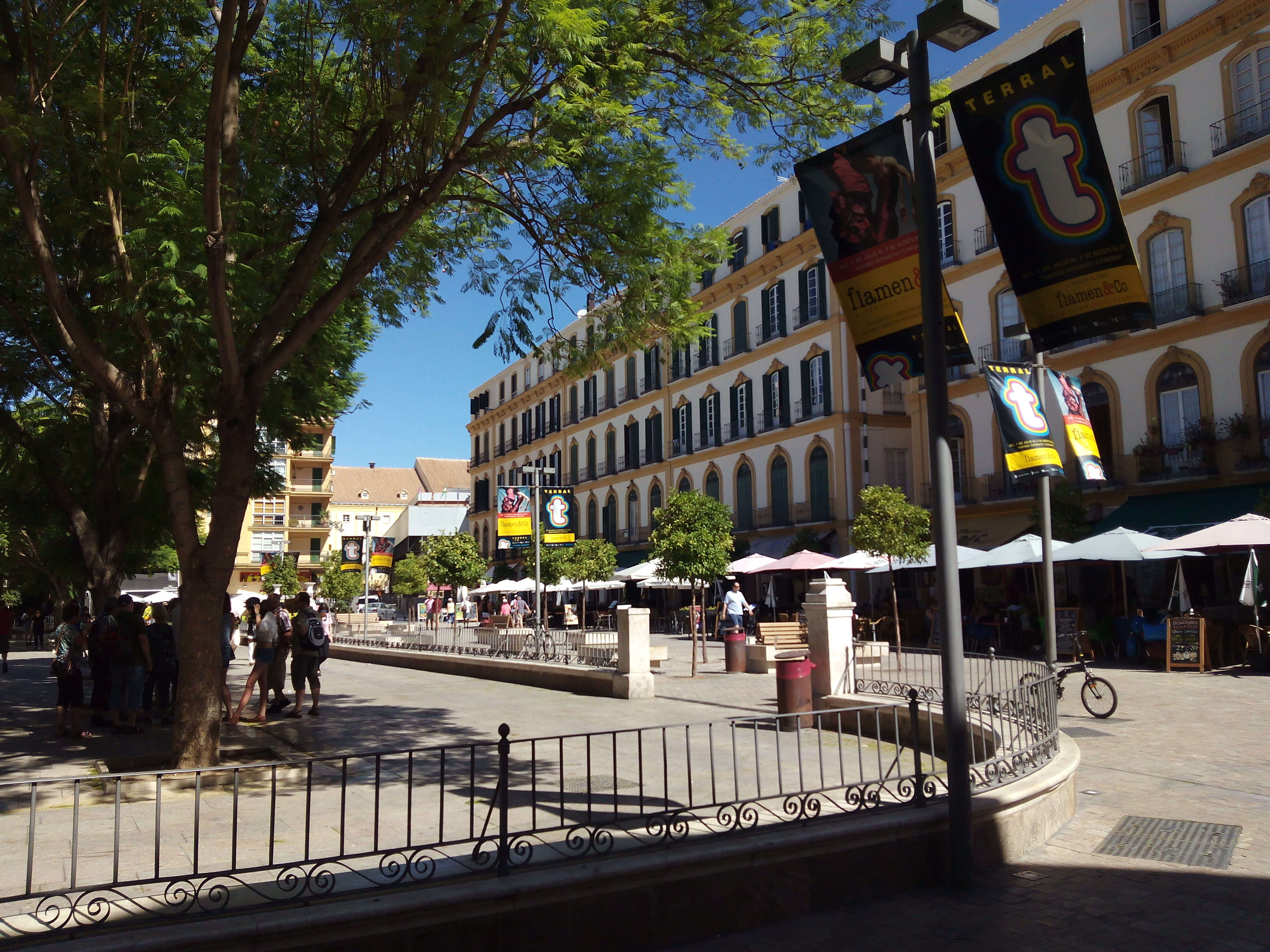 Lateral norte de la plaza de la Merded, en Málaga (España).